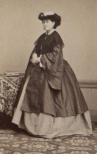 Графиня Евдокия Николаевна Апраксина, ур. Небольсьнна (1821—1886)